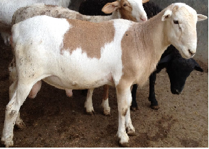 Borreguito Katahdin